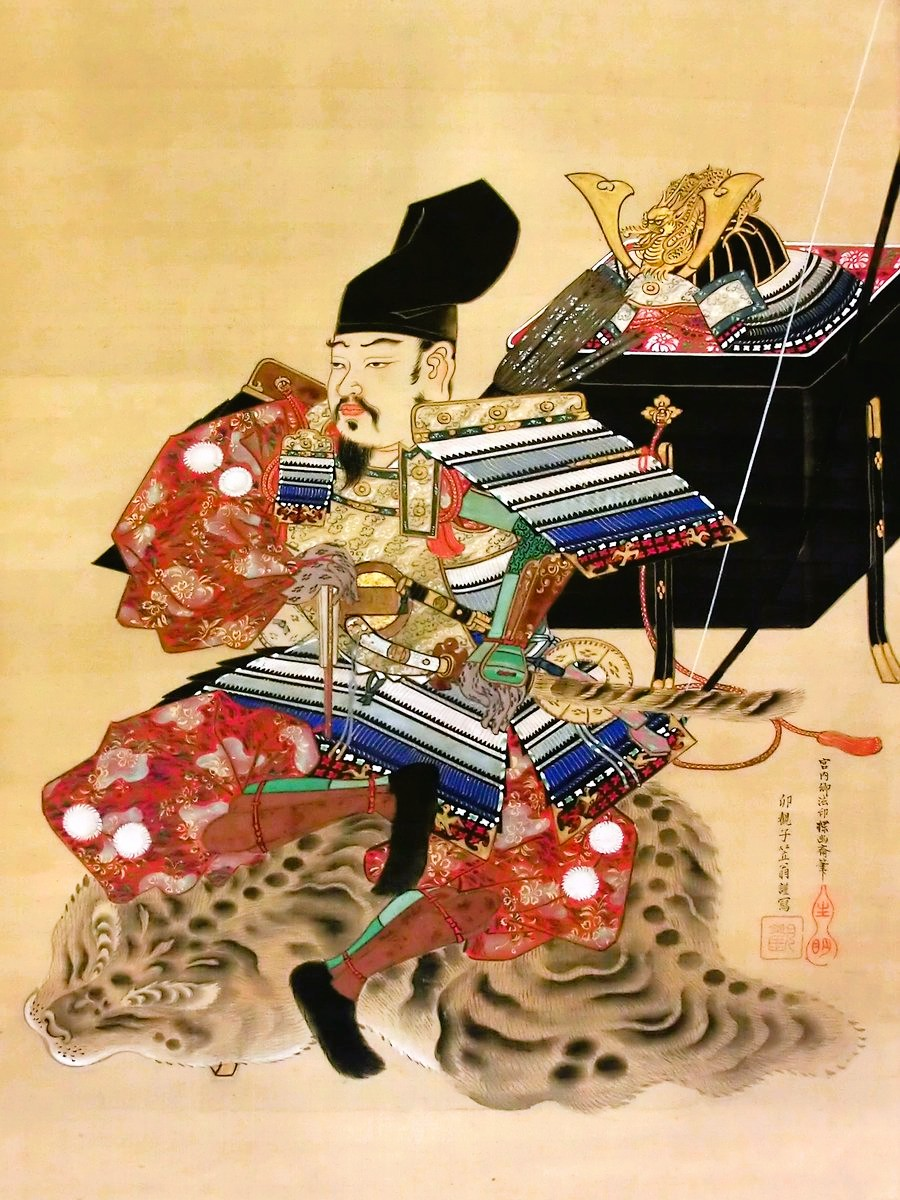 新田義貞肖像（福井市足羽山・藤島神社蔵）